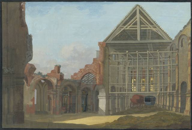 Poznań Collegiate by Alberti